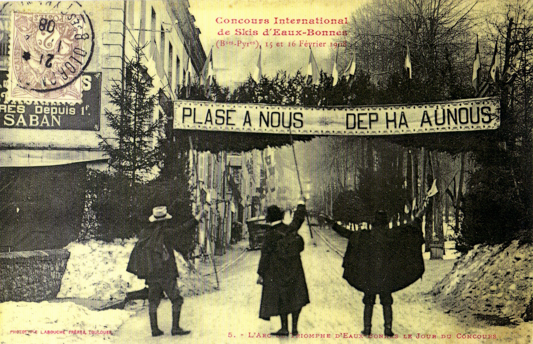 Concours de ski en 1908 aux Eaux-Bonnes - France